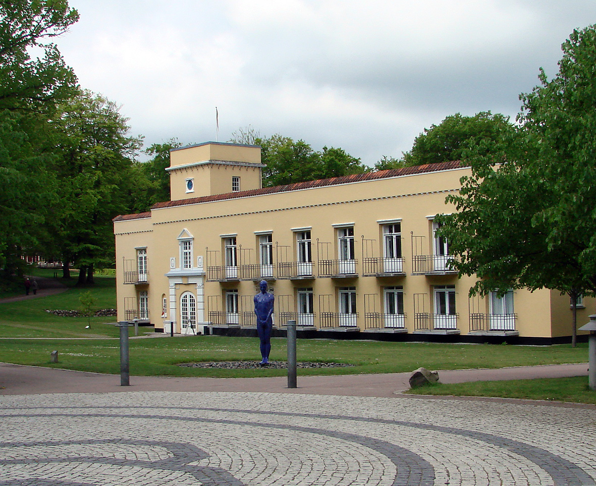 Silkeborg Bad